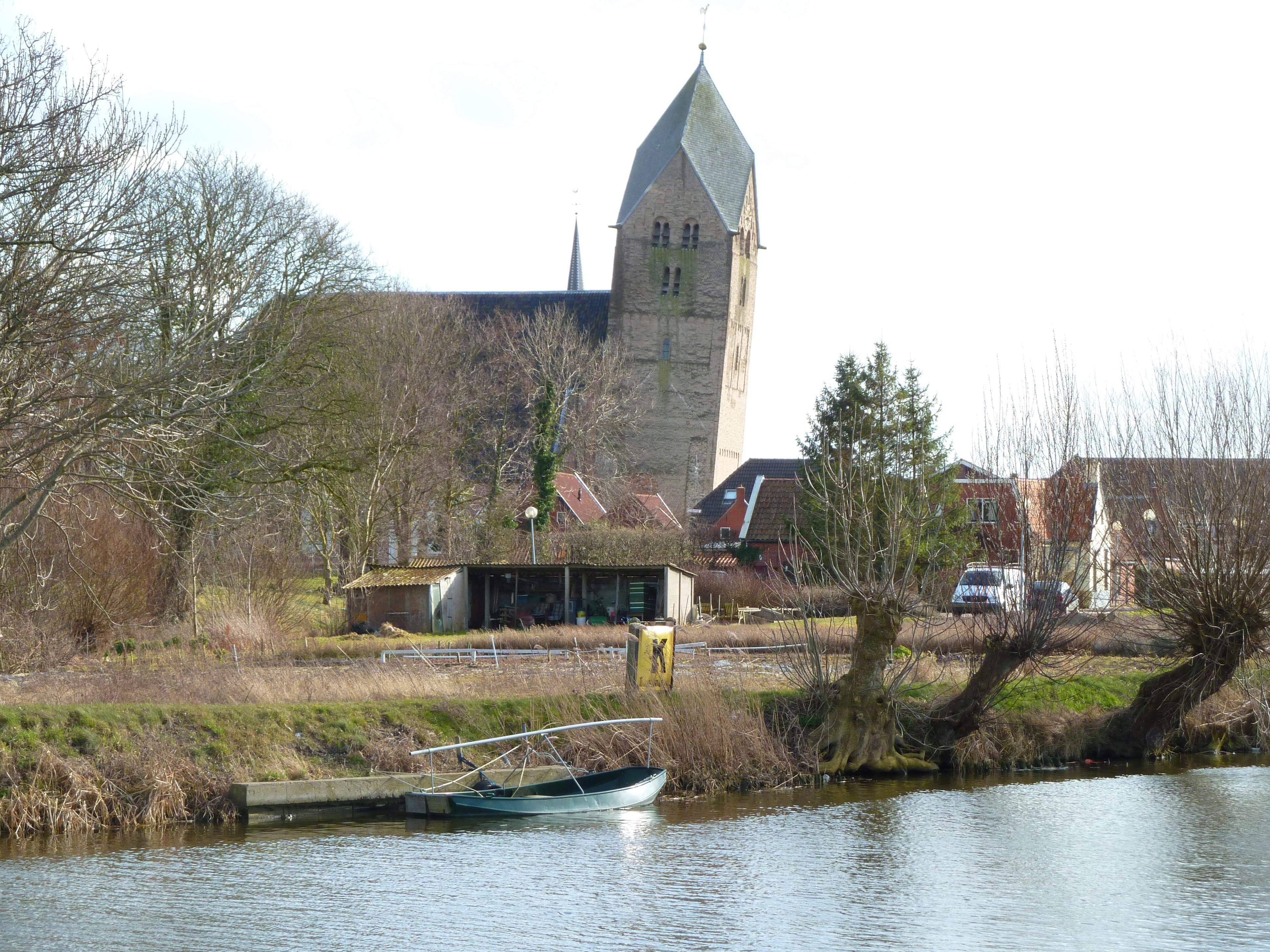 Walfriduskerk in Bedum gezien over het Boterdiep.